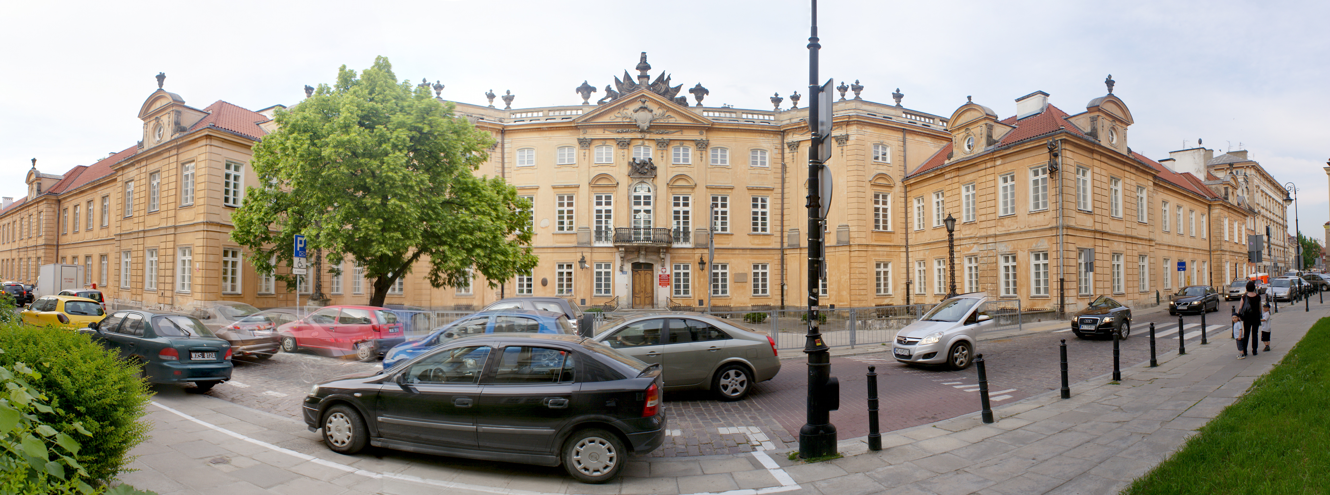 Pałac Sapiehów w Warszawie, ul. Zakroczymska 6